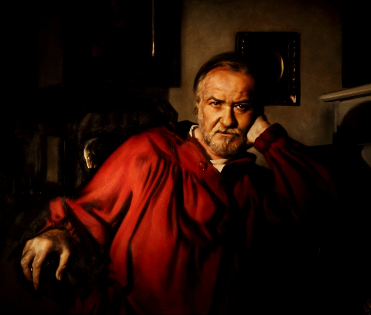 Giorgio Salmoiraghi Autoritratto 1972